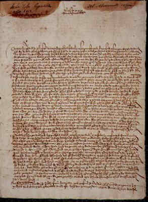 Letter From Admiral Diego Colón To Fray Francisco Ximénex De Cisneros, Cardinal Archbishop of Toledo Espaniola, 1512 The son of Christopher Columbus (Colón in Spanish), Diego inherited his father's title of Admiral of the Ocean Sea. He ultimately held the additional titles of governor and viceroy of the Indies. This letter to Cardinal Ximénez de Cisneros deals with conditions among the Indians in the Caribbean.